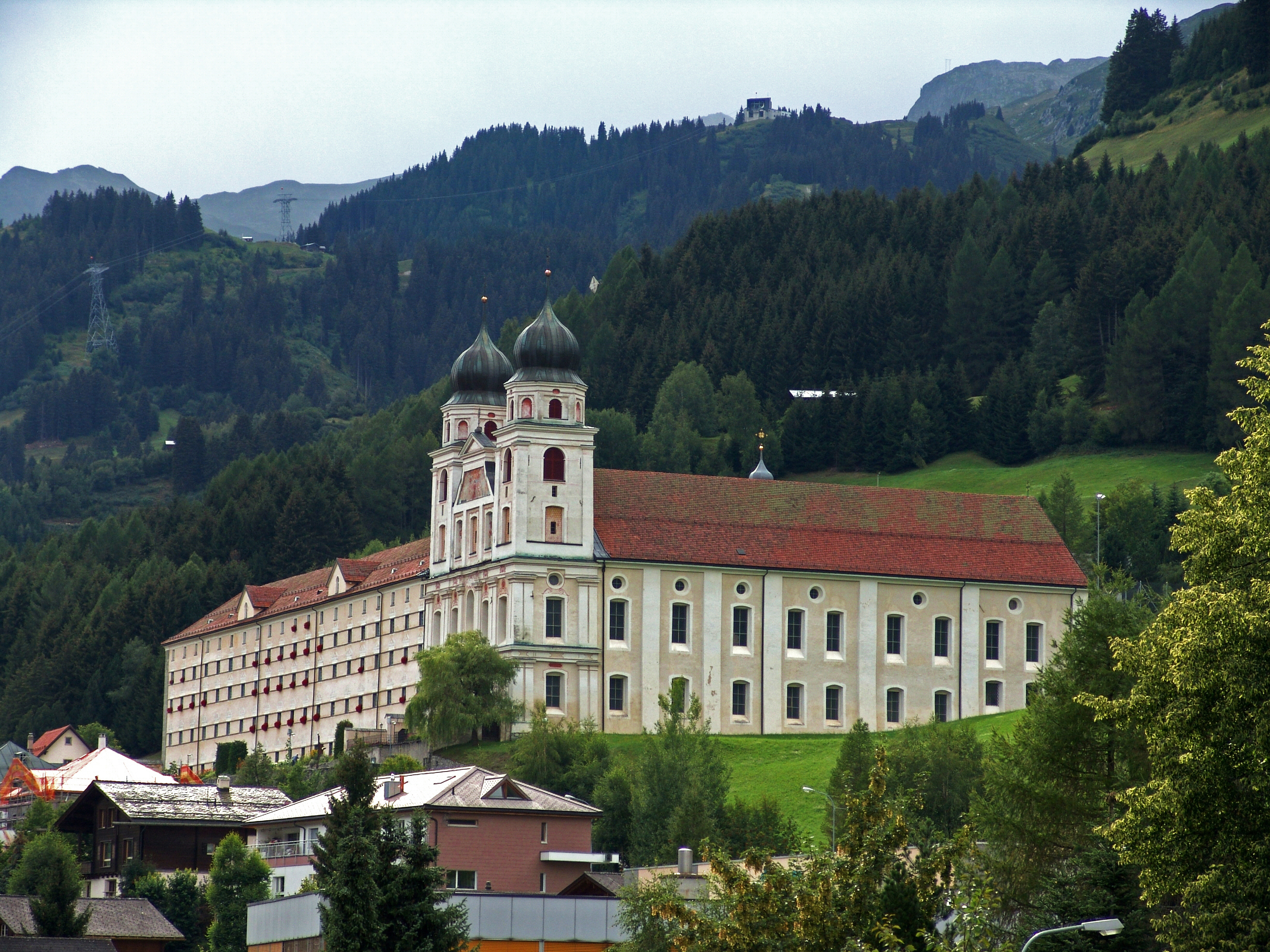 Claustra St. Martin, baselgia e conturn